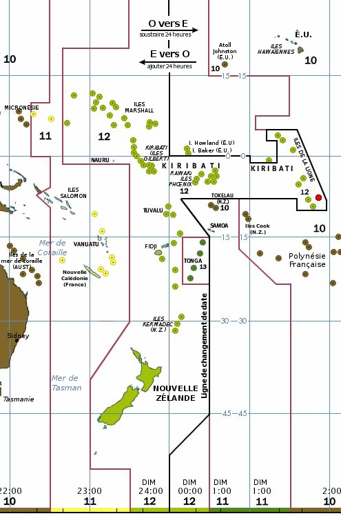 Version adaptée au Pacifique Sud de la ligne de changement de date post-1995, avec l'Île du Millénaire en rouge.